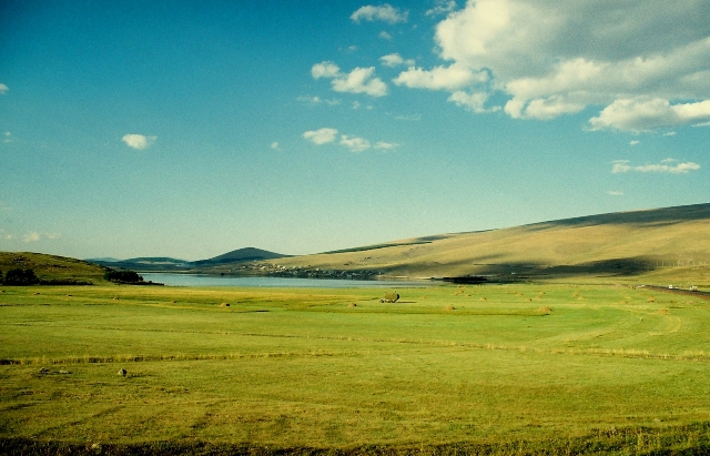 ჯავახეთი. ლანდშაფტი